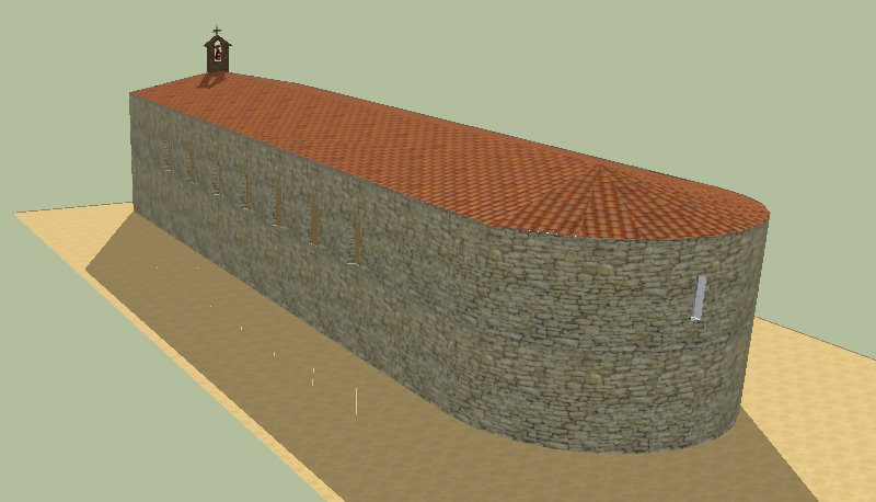 Reconstrucción de la ermita de San Miguel de afuera en Tudela de Navarra - España